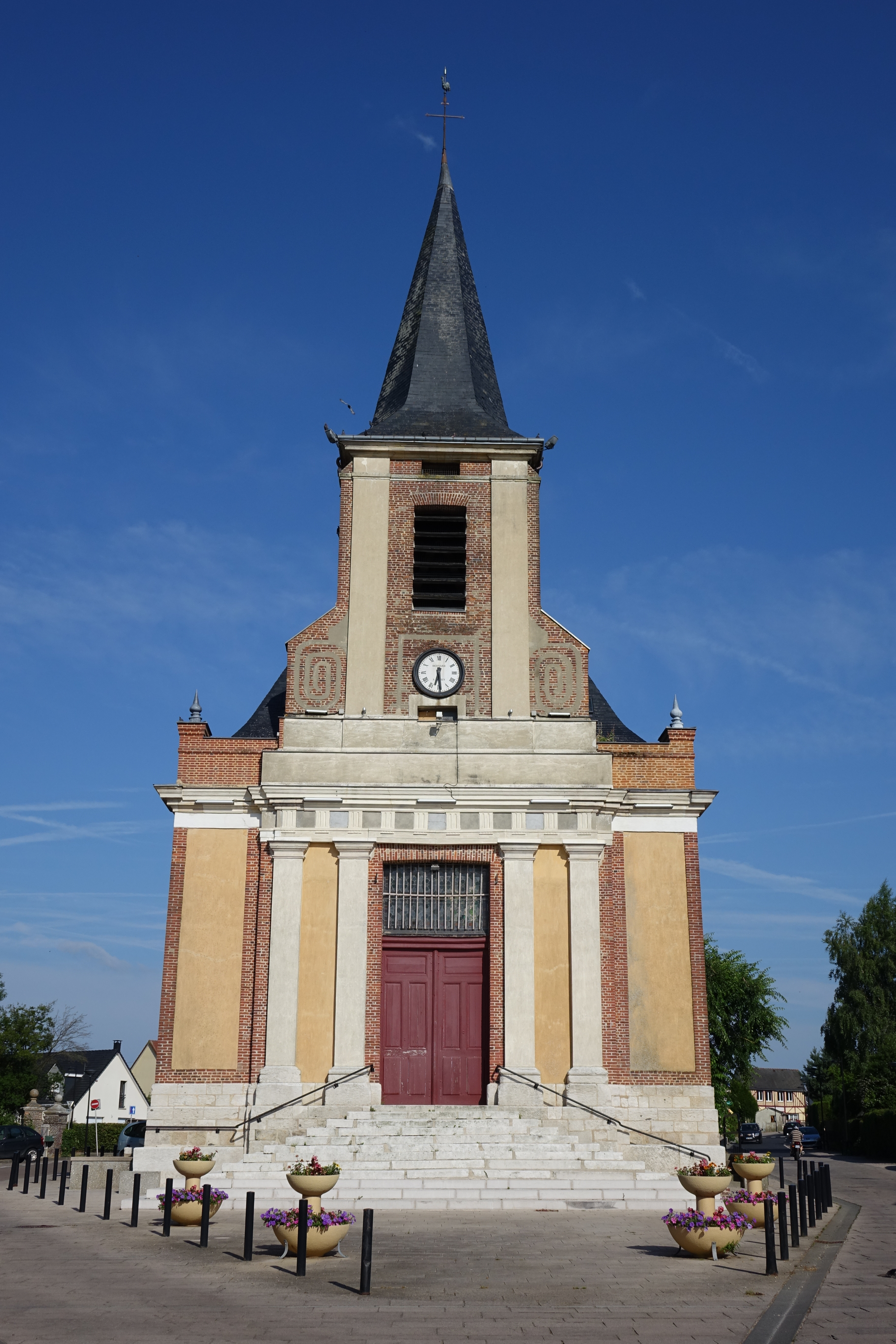 Église de Préaux, Seine-Maritime, France